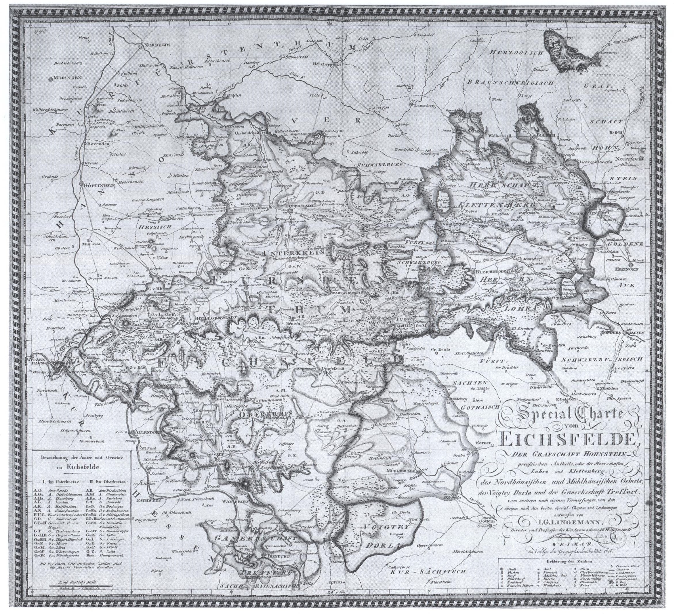 Special Charte vom Eichsfelde, der Grafschaft Hohnstein preußischen Antheils oder der Herrschaften Lohra und Klettenberg, des Nordhäusischen und Mühlhäusischen Gebiets, der Voigtey Dorla und der Ganerbschaft Treffurt. 1806 Von Johann Georg Lingemann (1770-1830), Direktor des Kön. Gymnasiums in Heiligenstadt (nach Inbesitznahme des Eichsfeldes durch Preußen Teilung des Eichsfeldes in den Unterkreis und Oberkreis)